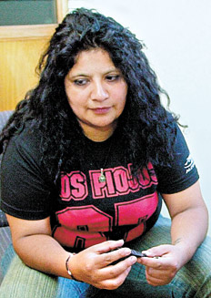 trabajadora sexual y dirigente sindical en Argentina